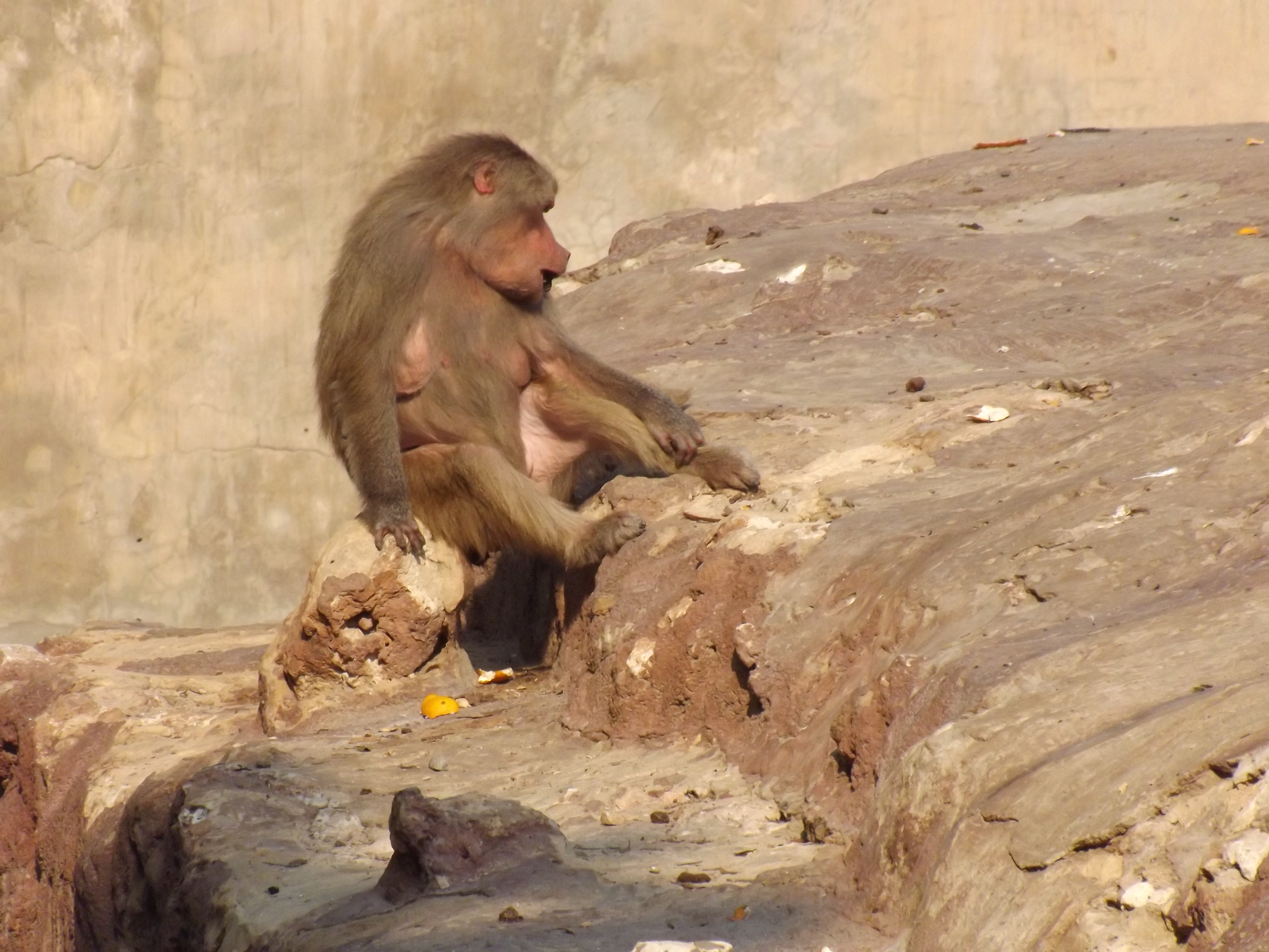 قرد حبشي في حديقة حيوان النزهة - الاسكندرية